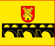 Flag of Pakruojis and Pakruojis district